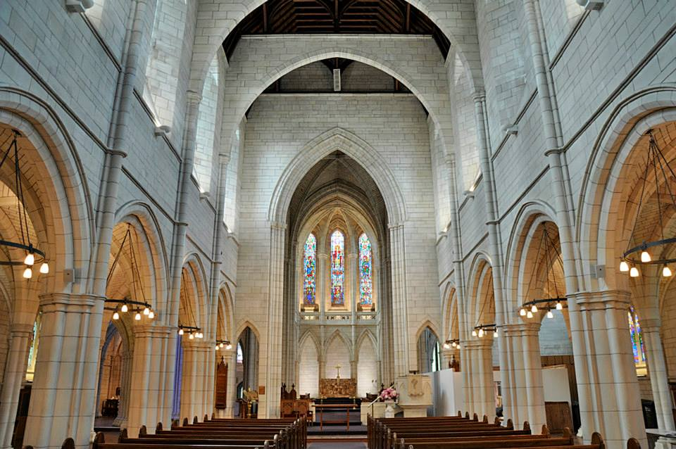 Interior